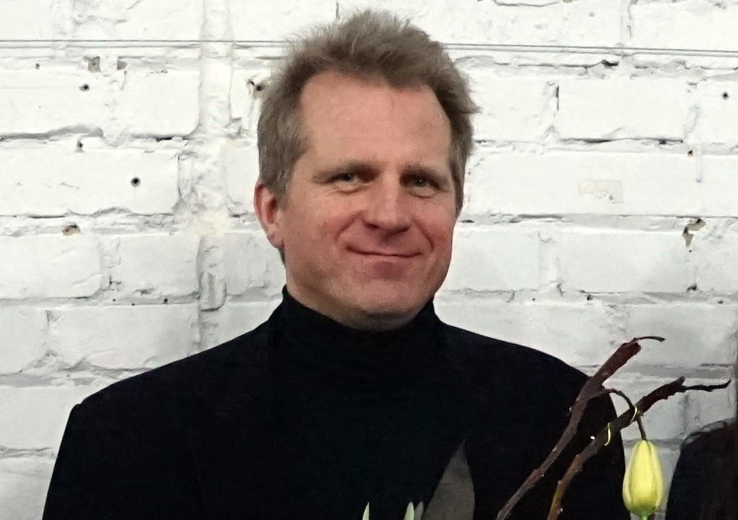 Arne Maasik, fotonäituse "Vaga vesi" avamine Budapestis